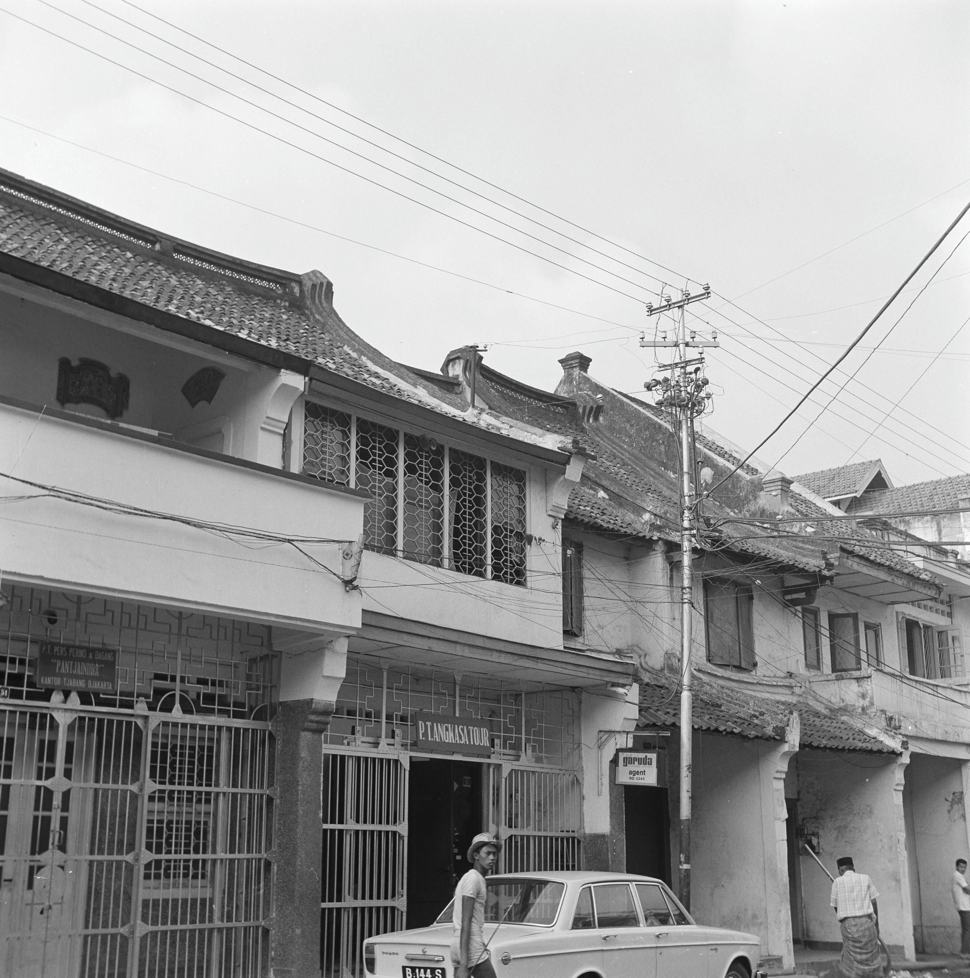 Chinese wijkOnderwerp: Straten, straatbeelden